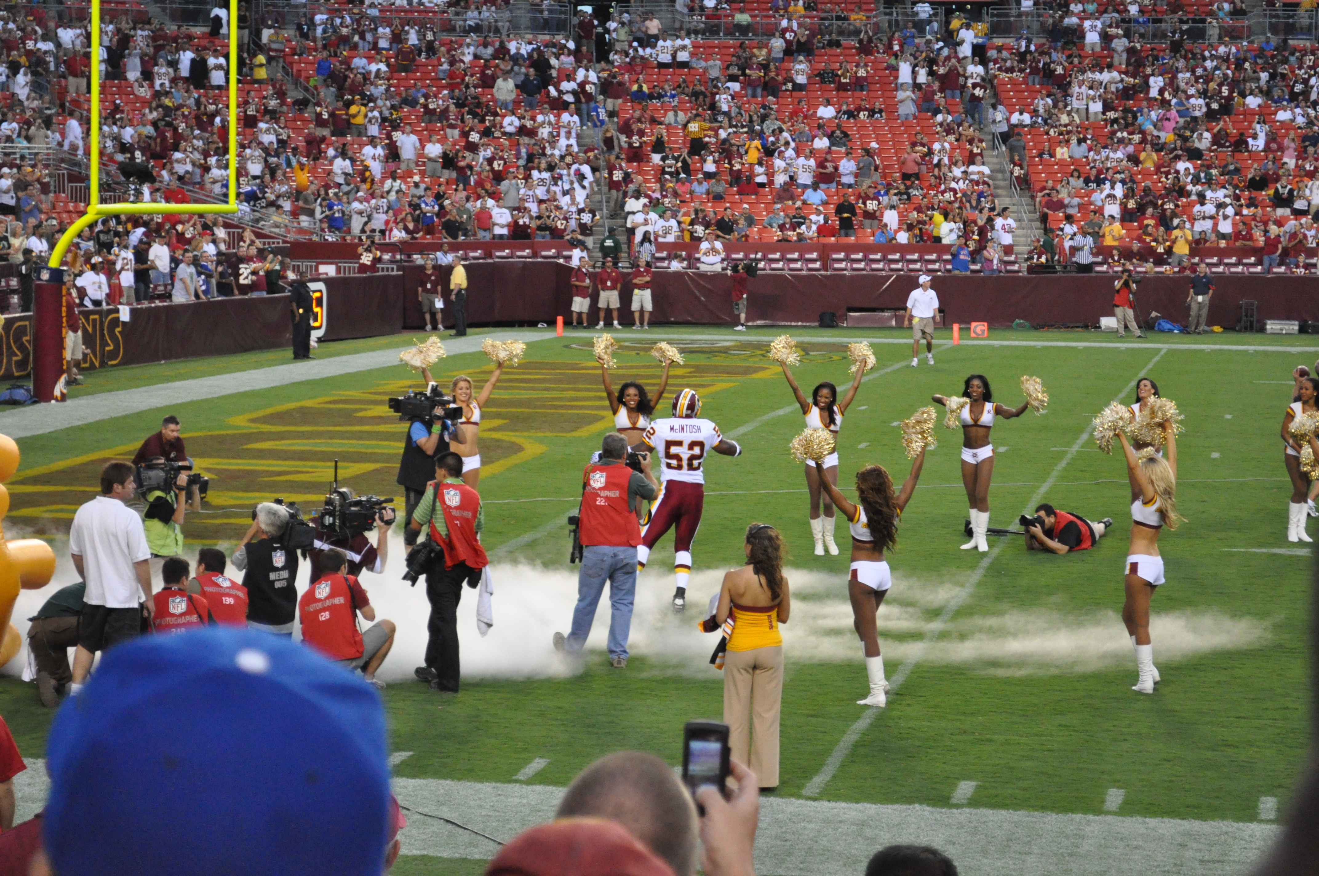 REDSKINS-BILLS